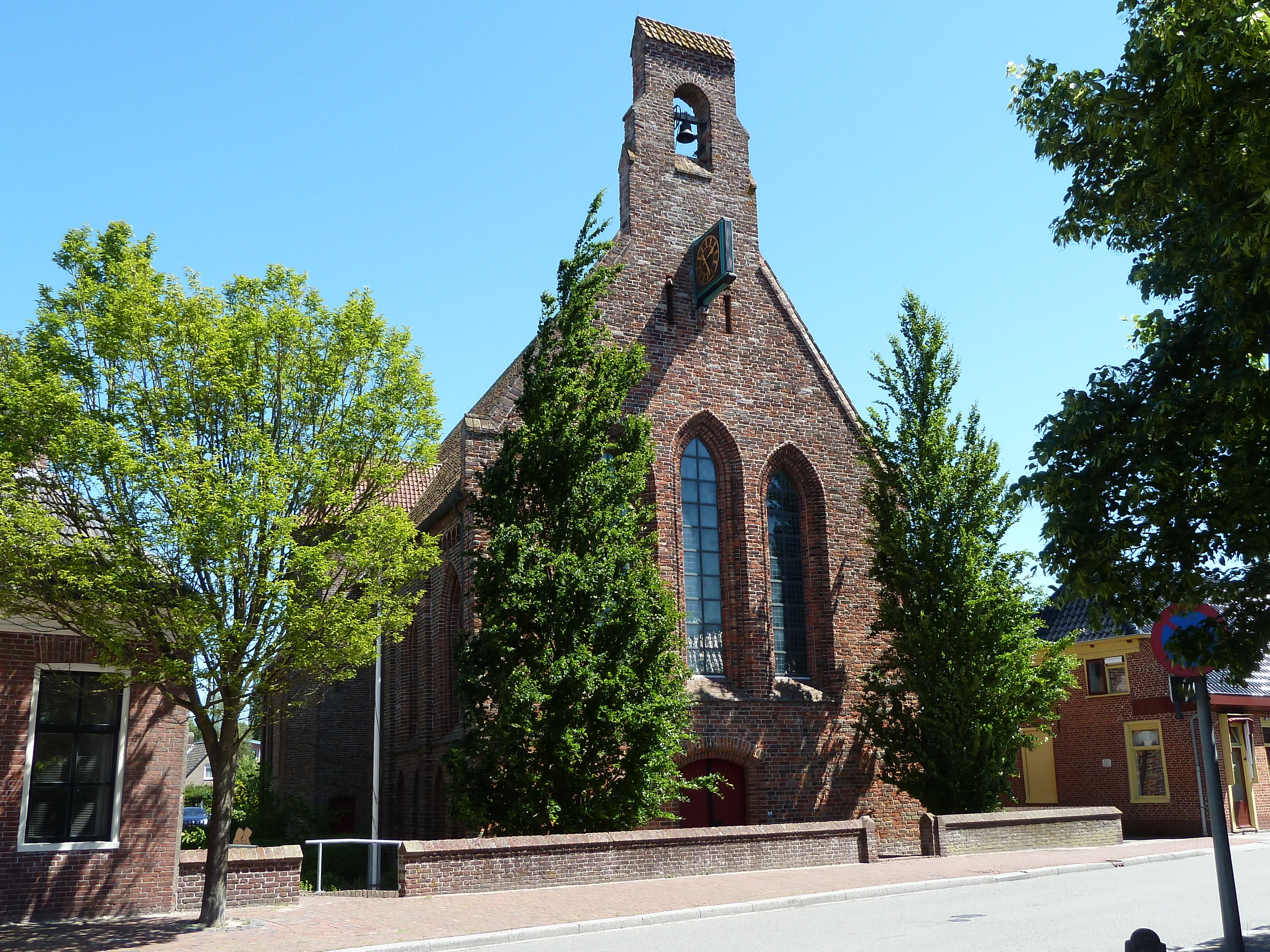 Voormalige ziekenhuiszaal van het vroegere klooster van Aduard aan de Burgemeester Seinenstraat 42, Aduard, later omgevormd tot hervormde kerk. Het enige gebouw dat bleef staan na de reductie van Groningen.